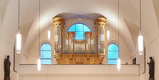 Orgelweihe am 08. Oktober 2017